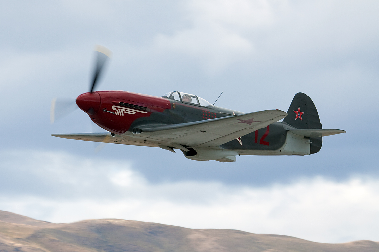 ZK-YYY Yakovlev Yak-3M. Warbirds Over Wanaka, New Zealand. April 2010